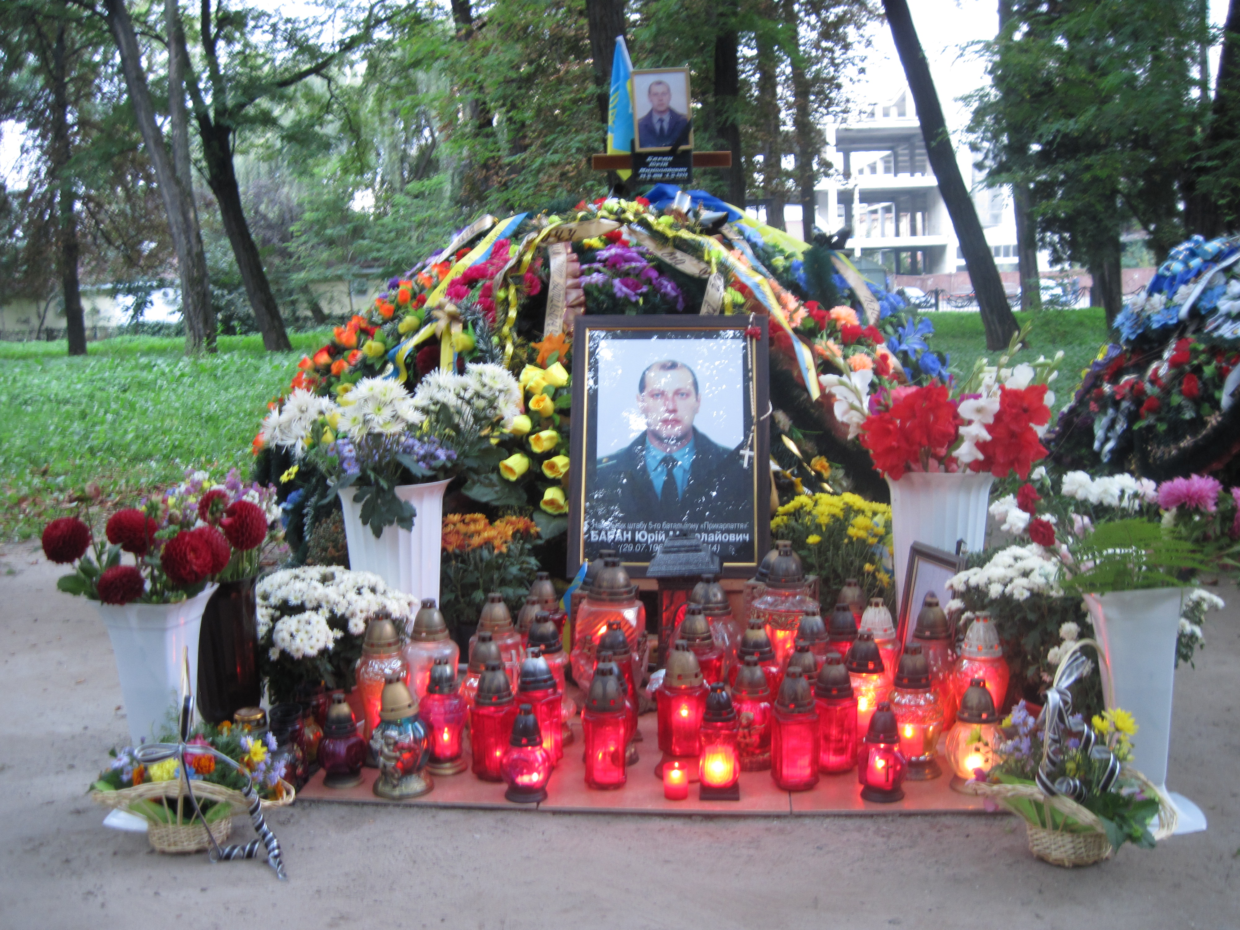 Могила Юрія Барана, Франківськ